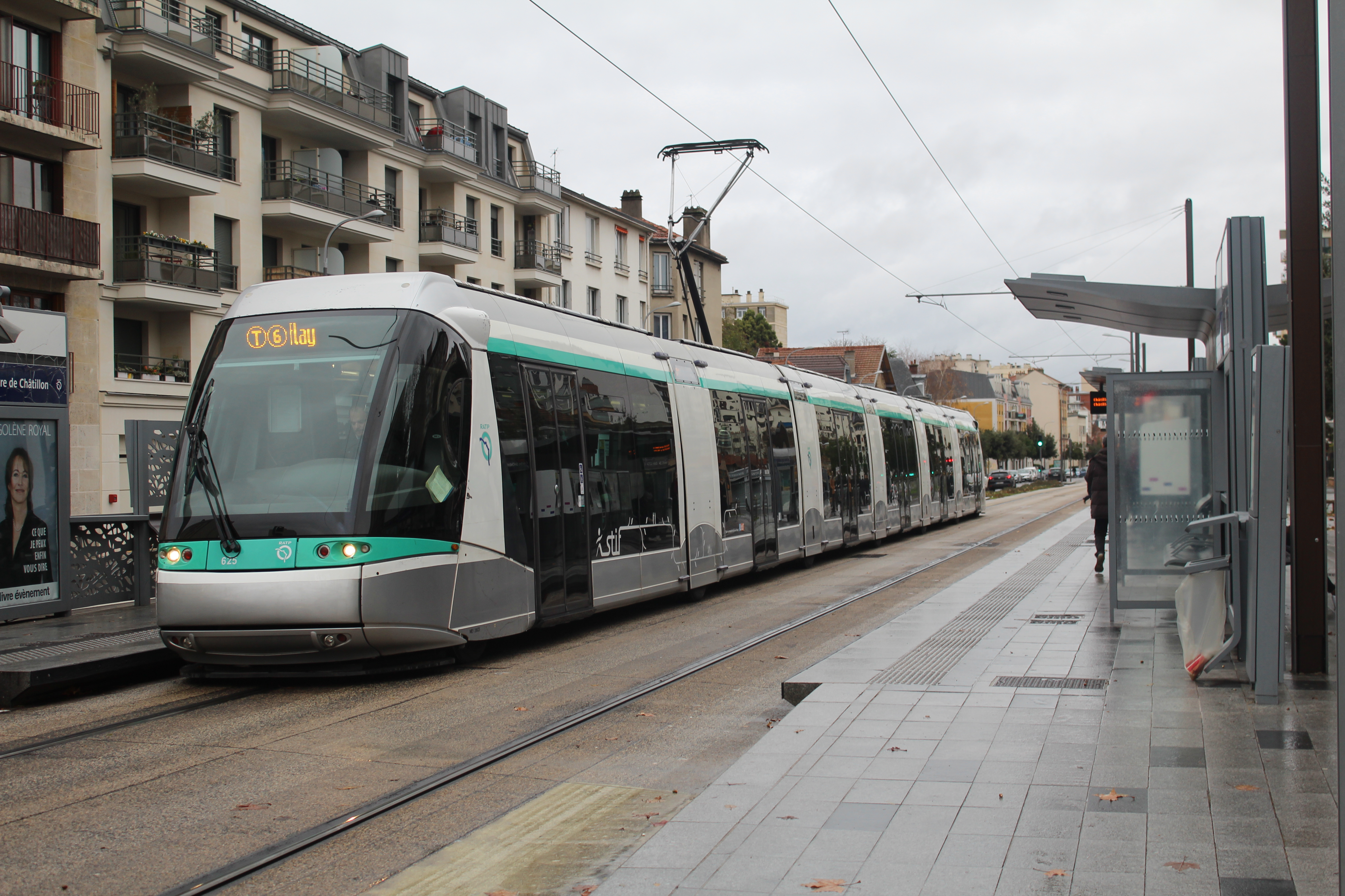 Station Centre de Châtillon de la ligne 6 du tramway d'Île-de-France, Hauts-de-Seine.